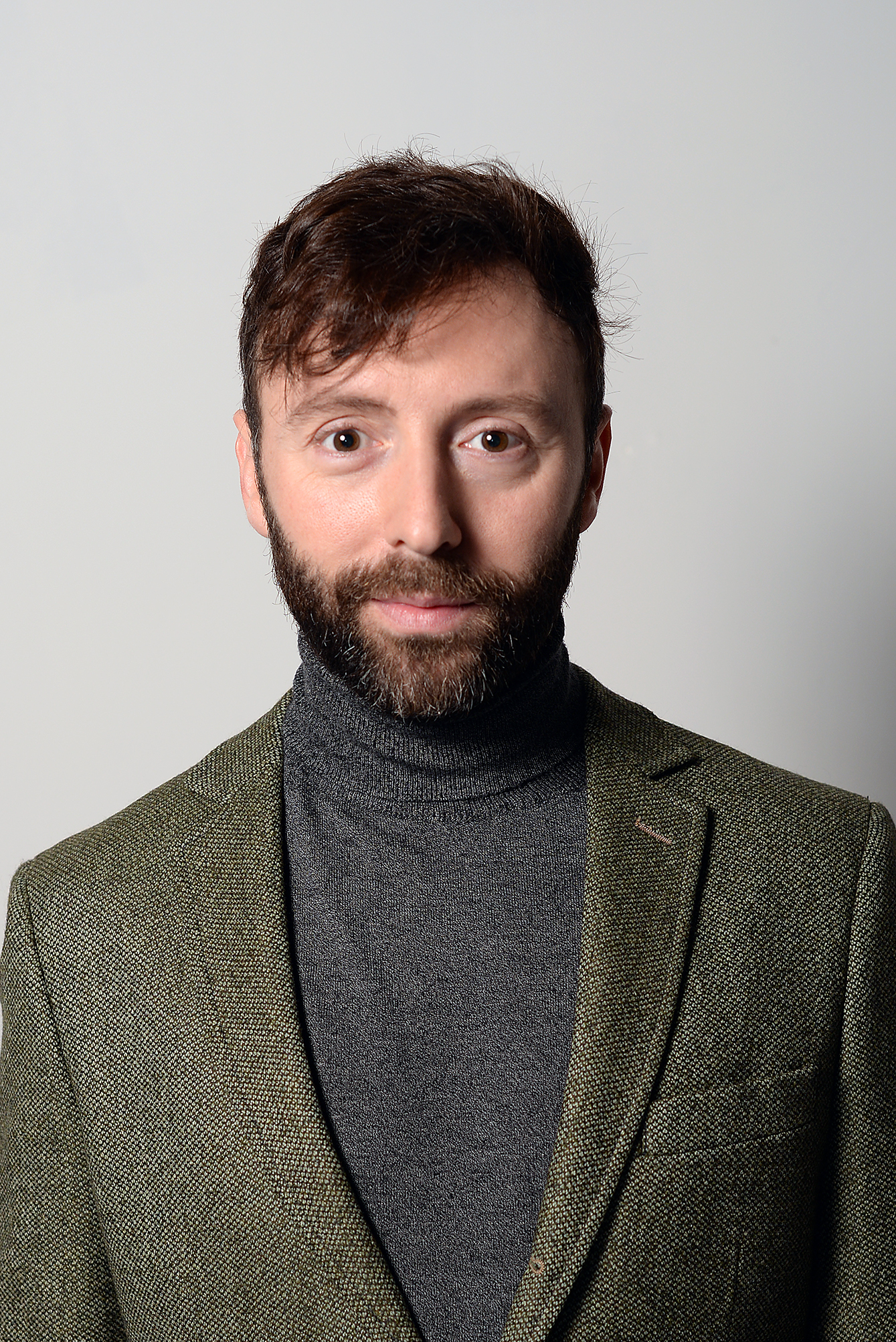 Dafnis Balduz